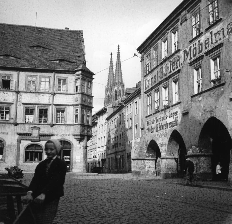 Aufnahme 1932 Görlitz Der Untermarkt mit Blick auf die Kirche St. Peter und Paul. Links Ecke zur Peterstr. 1, Haus von 1552 mit Erker